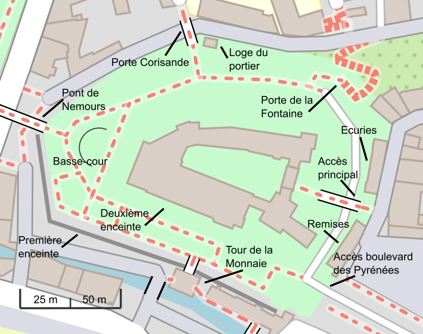 Accès et dépendances du château de Pau